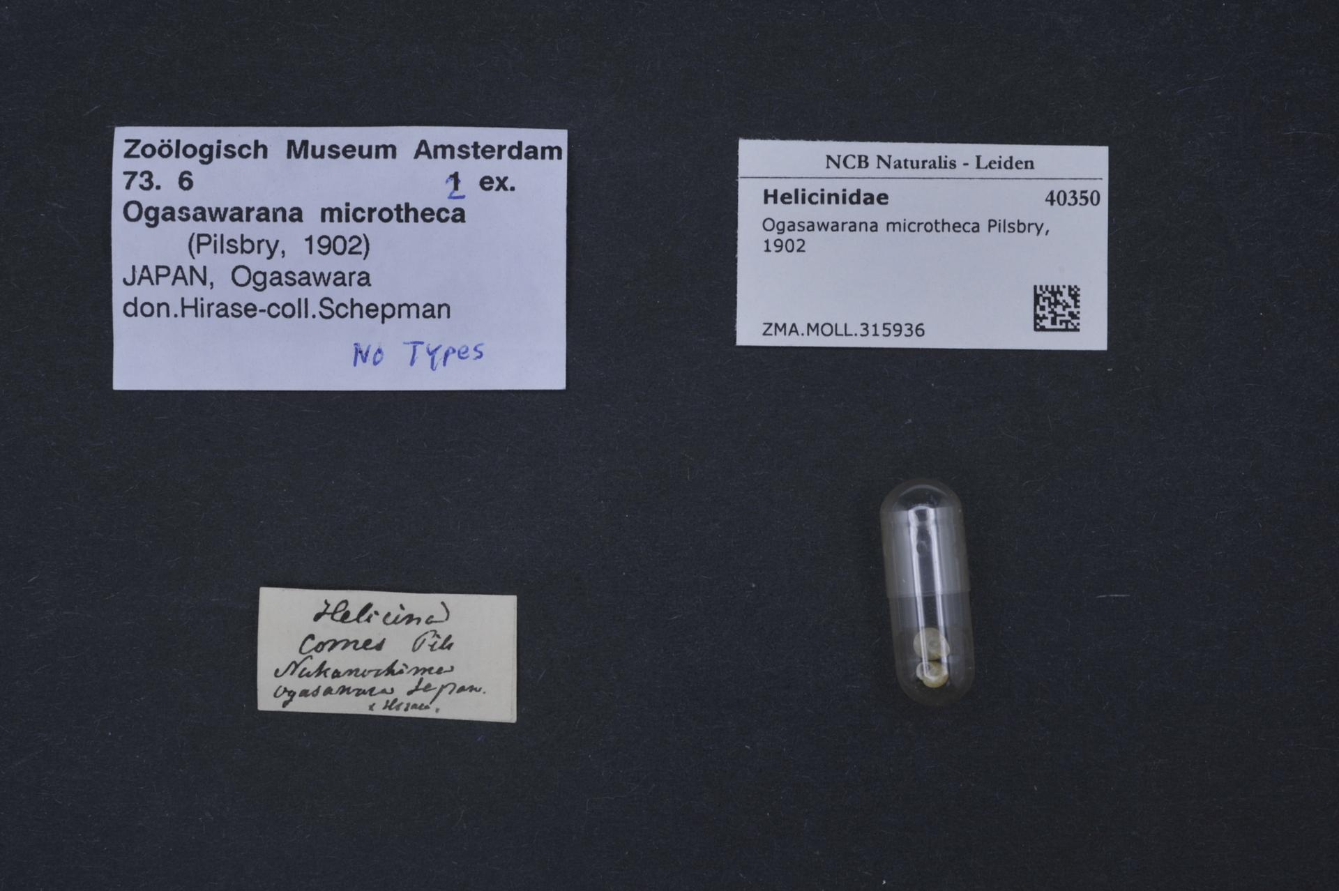 Ogasawarana microtheca Pilsbry, 1902